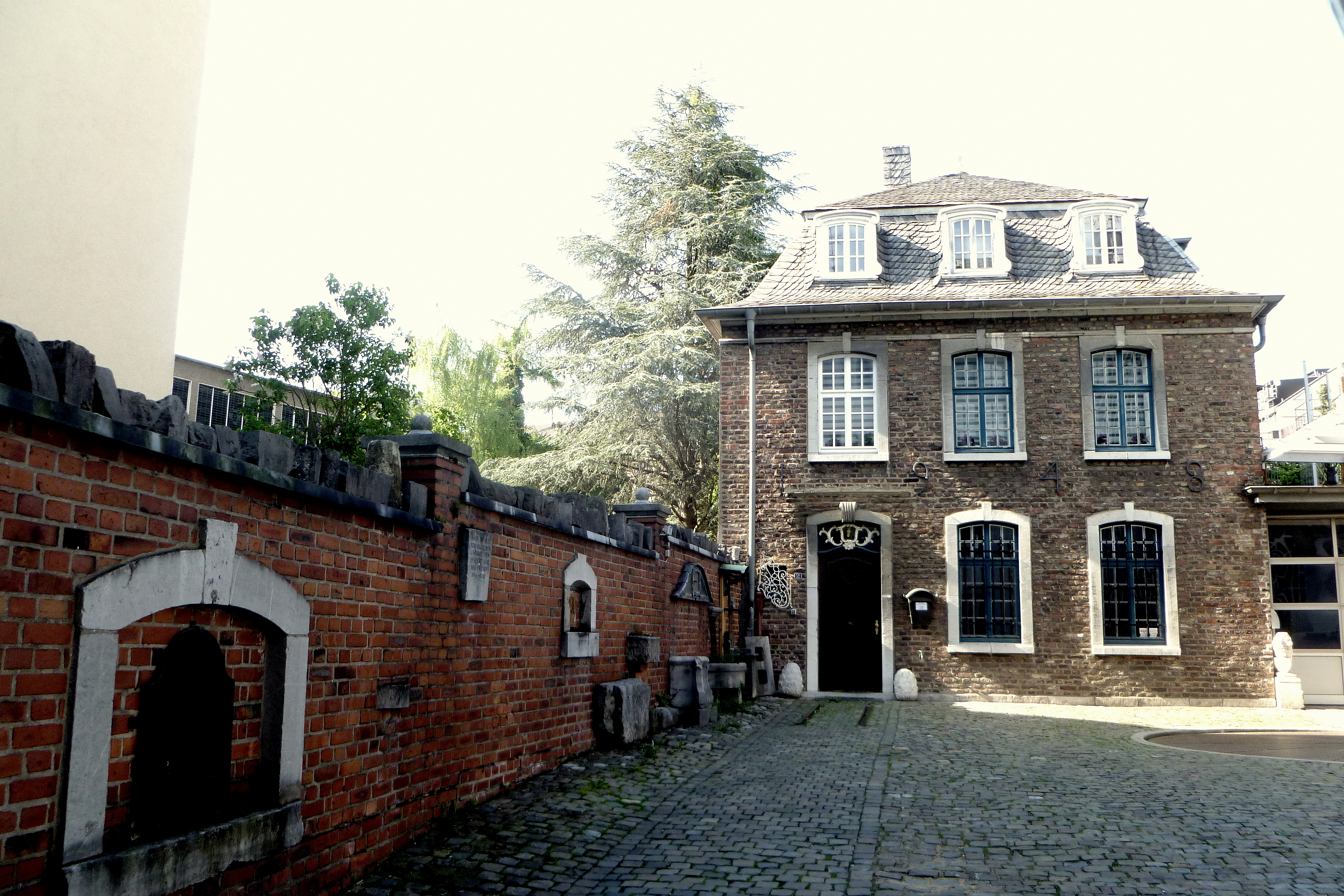 Baudenkmal in Aachen-Mitte